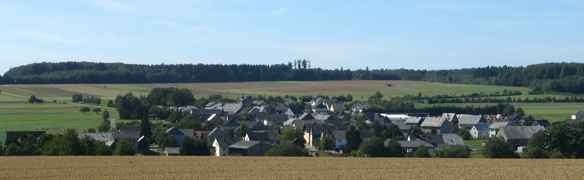 Reich/Hunsrück aus süd-östlicher Richtung